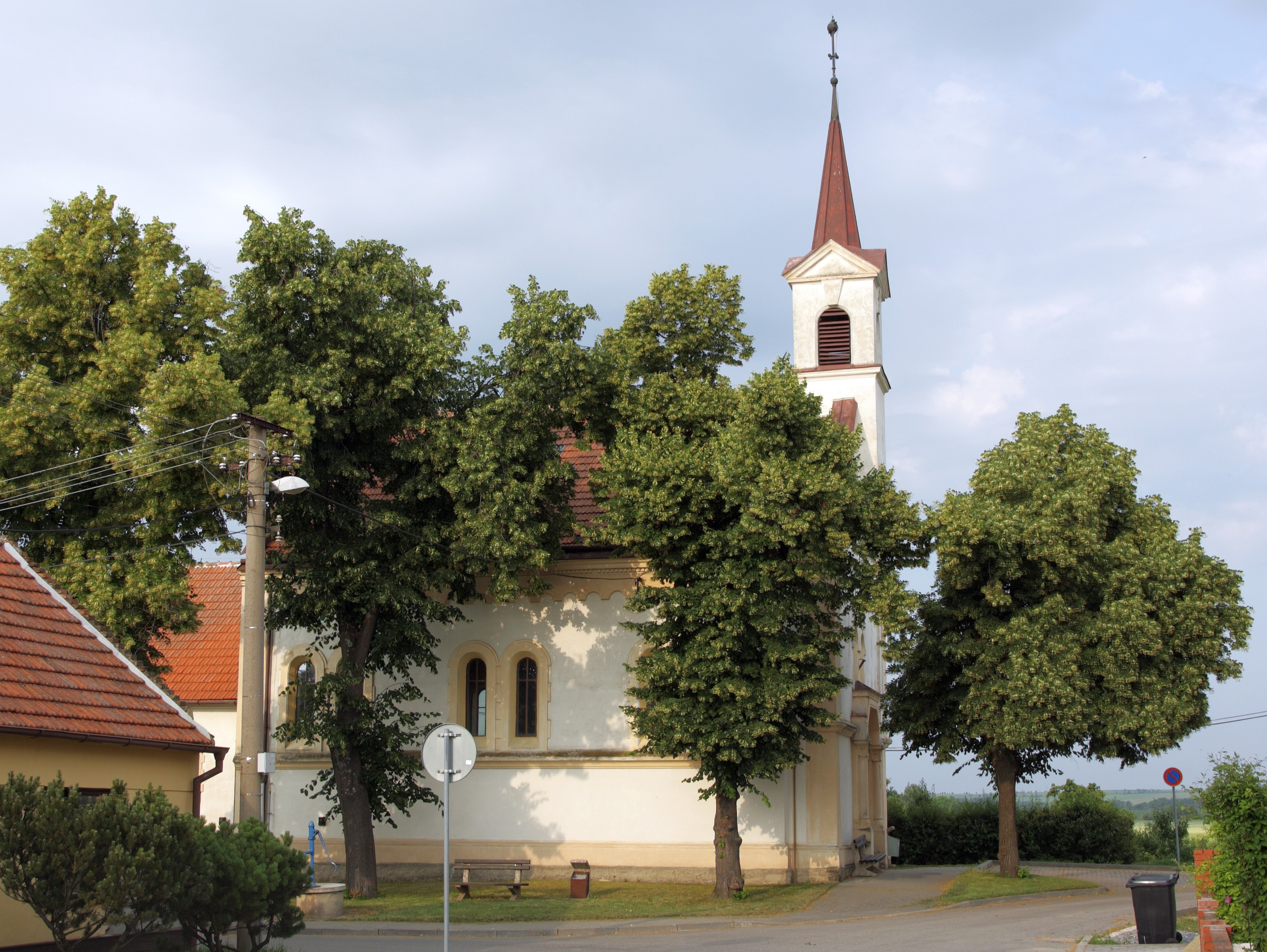 Rychmanov, evangelický kostel.